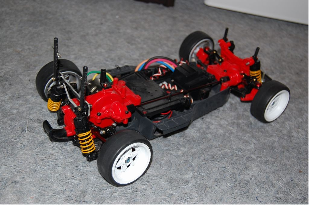 Фото автомодели Tamiya TA-01